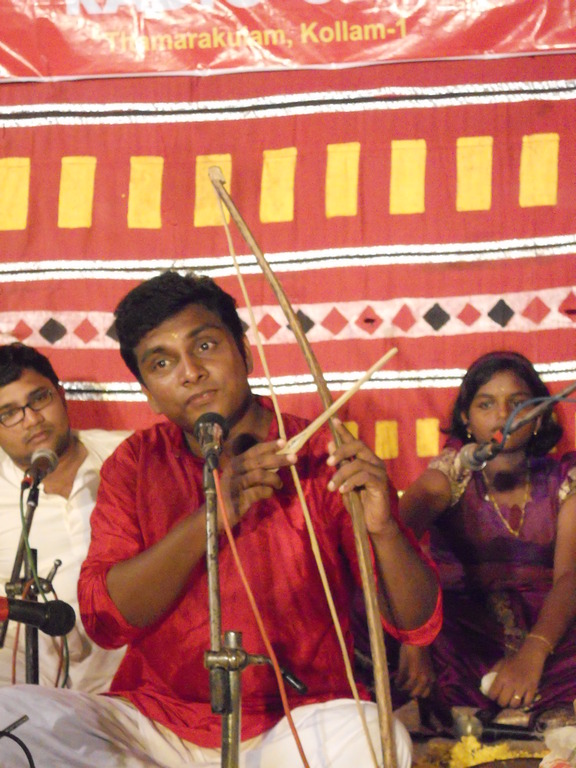 ഓണവില്ല് ഉപയോഗിച്ചുള്ള പാട്ട്